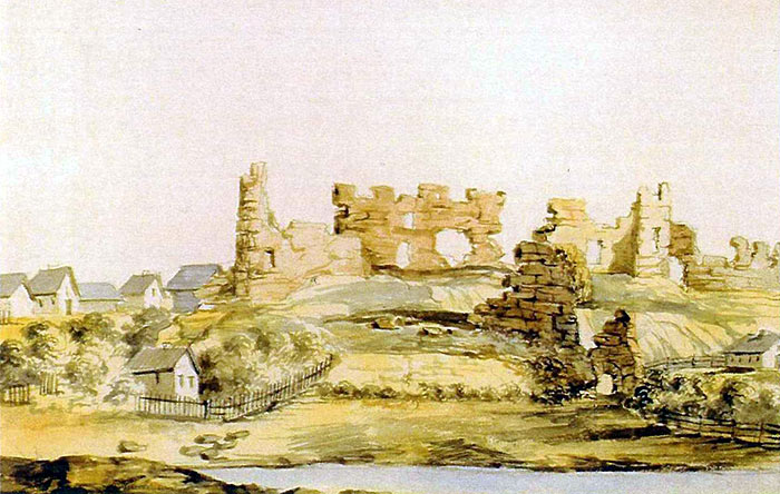 Беларуская (тарашкевіца): Віцебск (Viciebsk). Замак